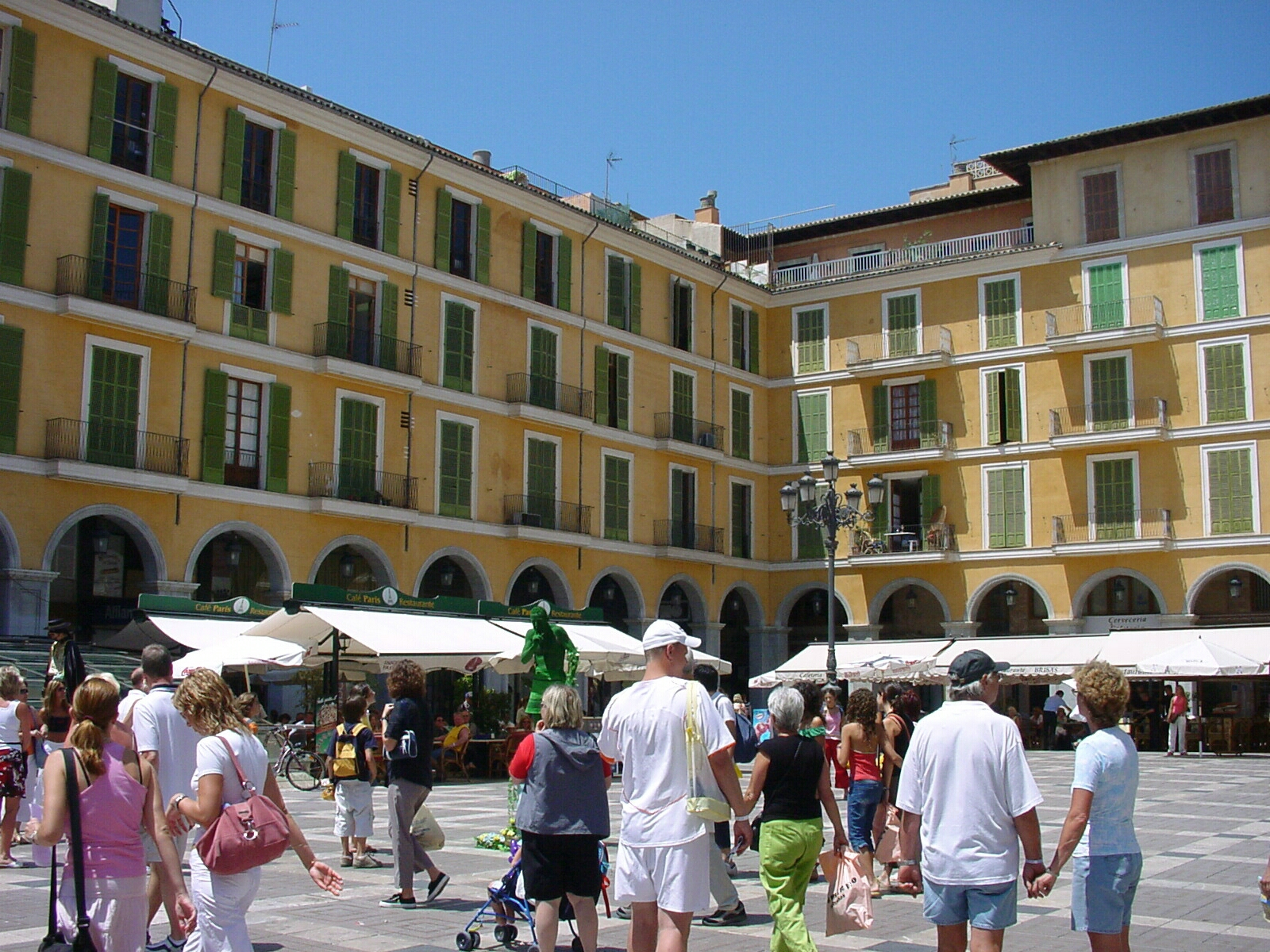 Plaça Major in Palma de Mallorca